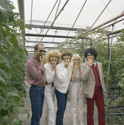 De Franse groep Profil tijdens een fotosessie voor het Eurovisie Songfestival 1980